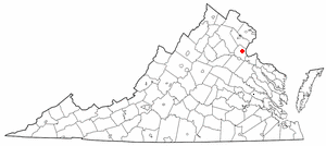 va maps